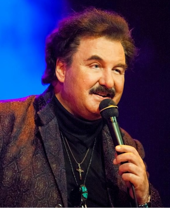 Koncert Krzysztofa Krawczyka w Białymstoku, czerwiec 2018